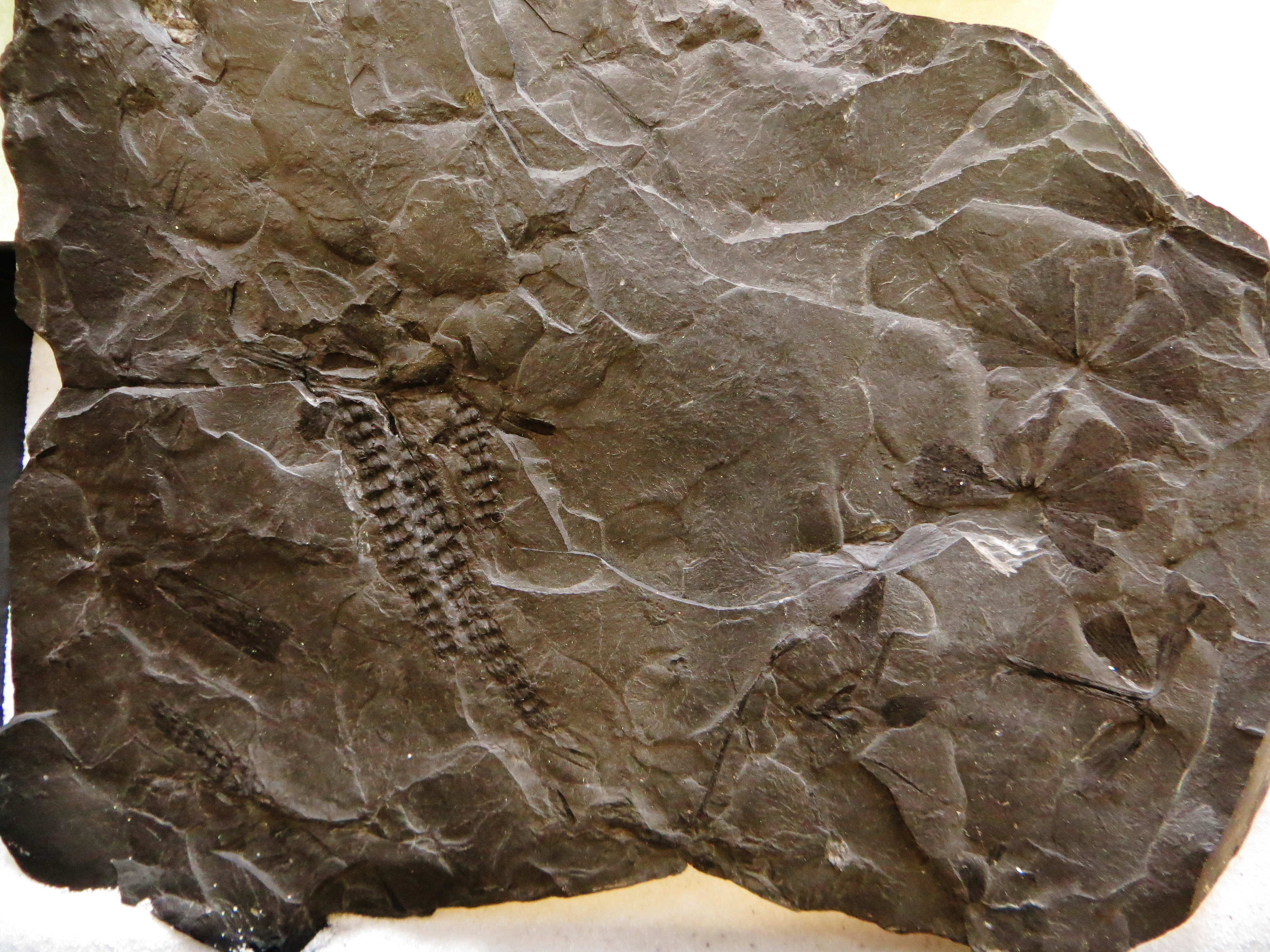 Fossil of plant - Took the picture at Natural History Museum, Bonn University